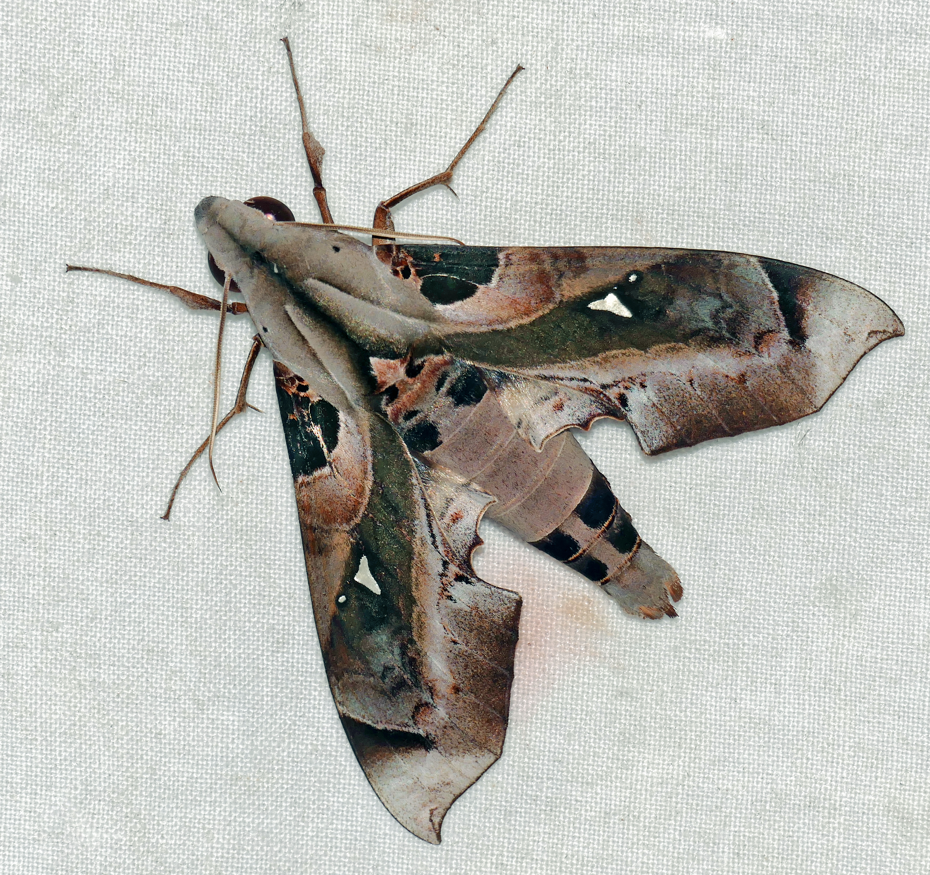 Madoryx plutonius male. D6 Route de Kaw, Roura, French Guyana, FRANCE